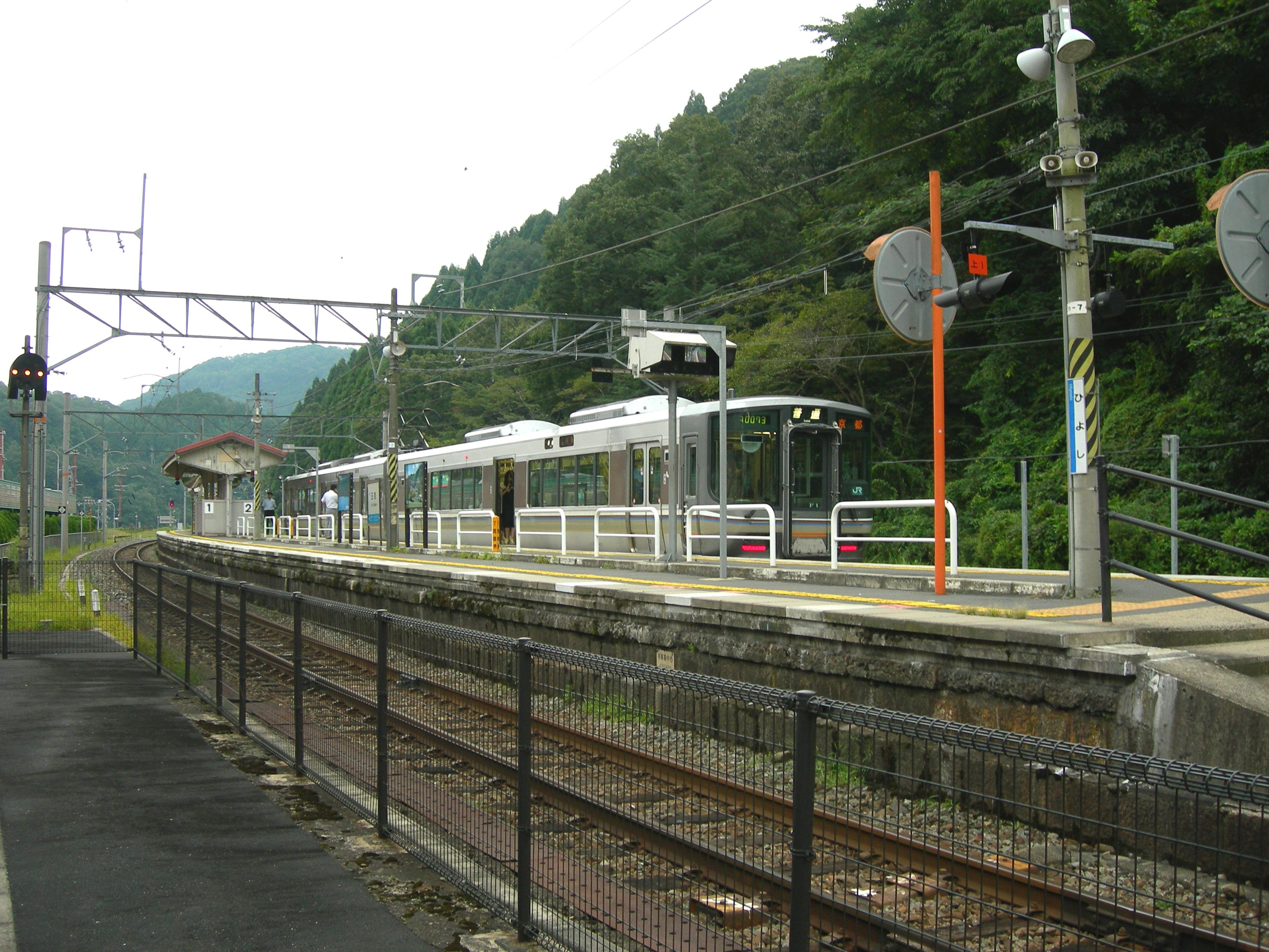 JR西日本 日吉駅 (京都府)プラットホーム